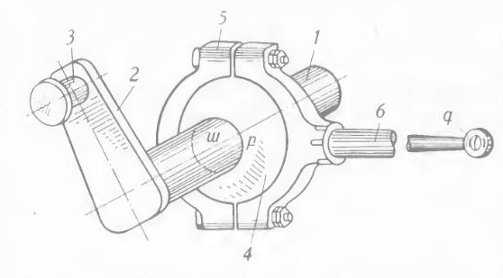 Սխեման